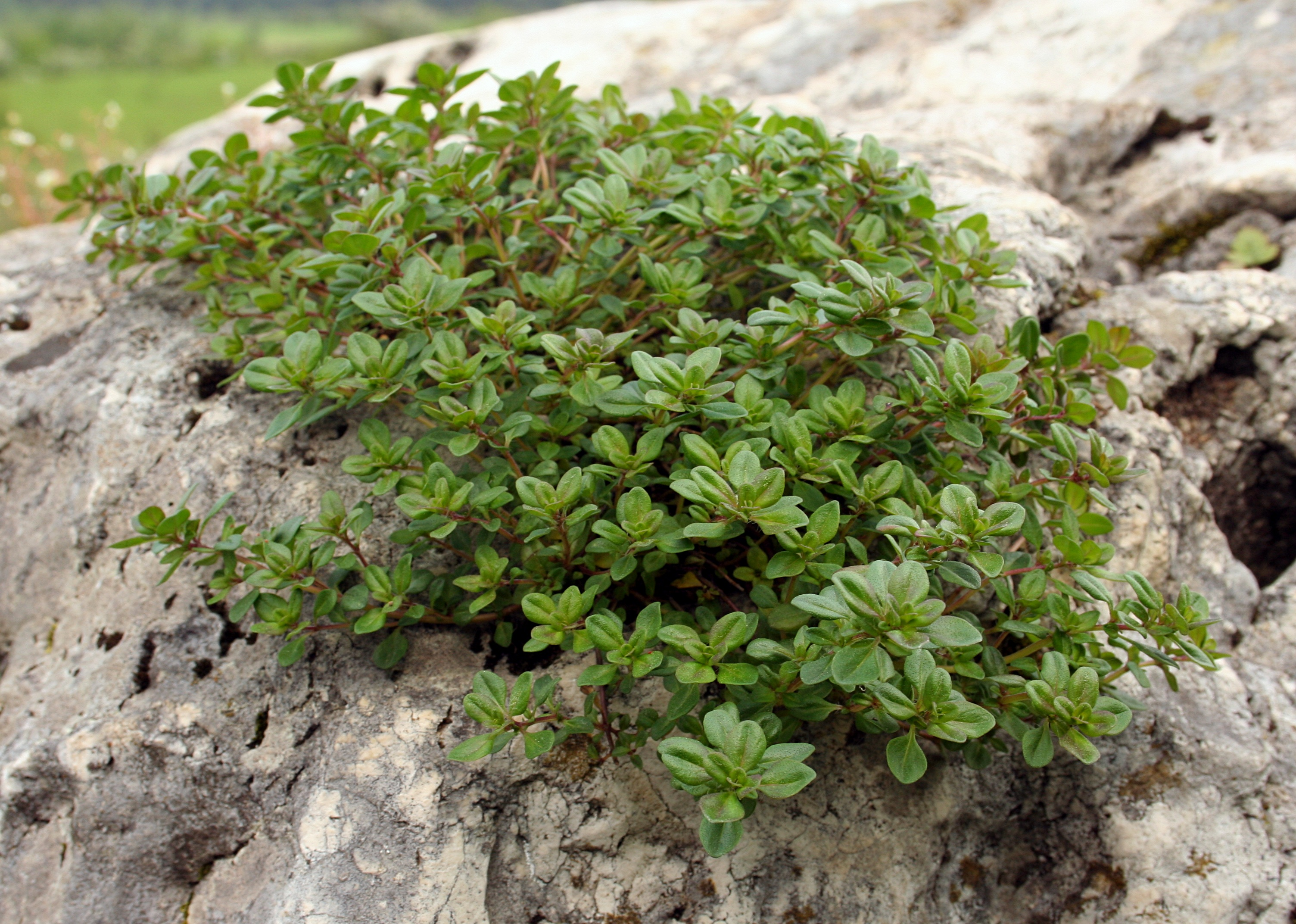 Skały Rzędkowickie. Niezidentyfikowana roślina naskalna.